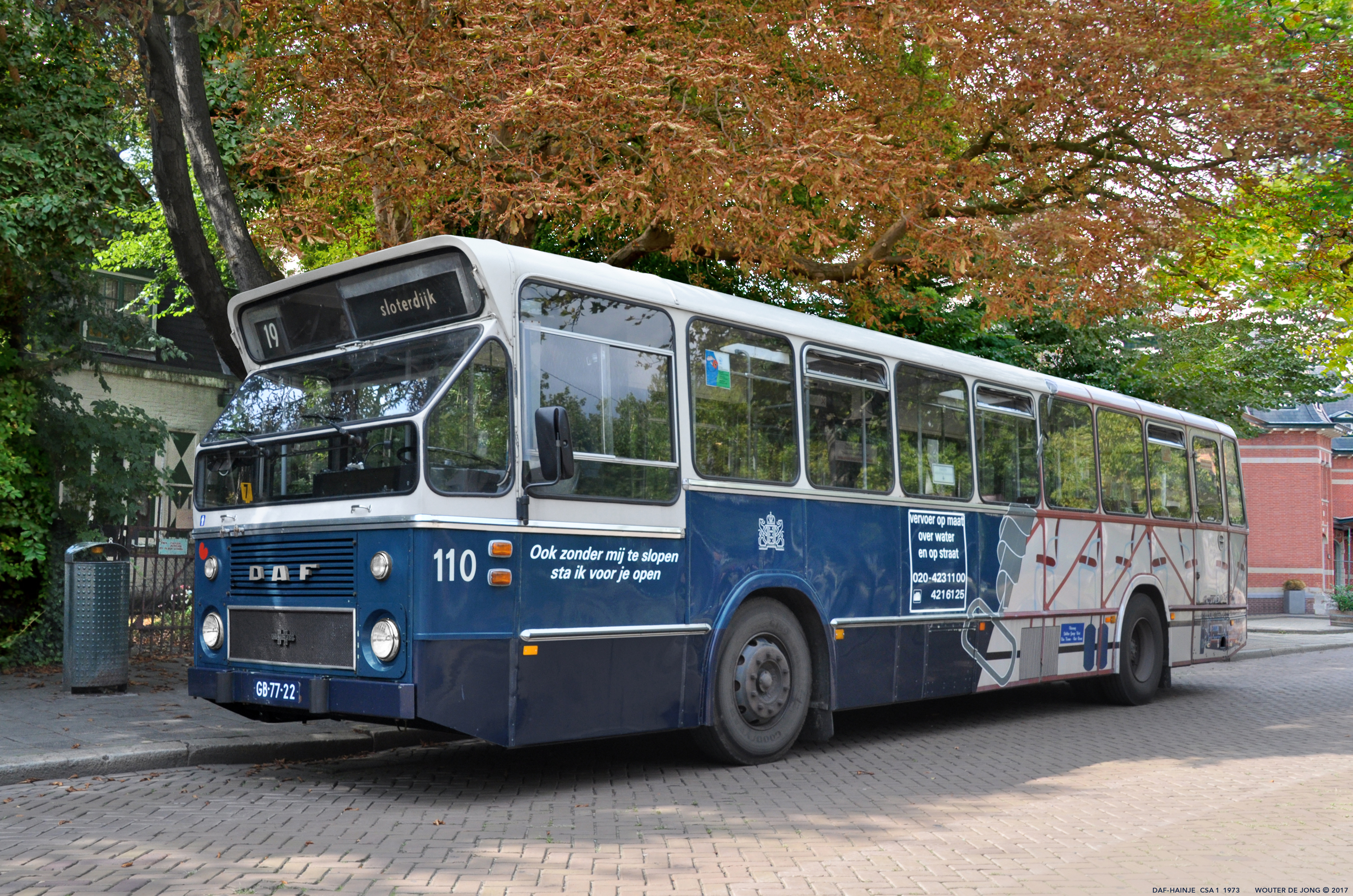 De DAF-HAINJE ex. GVB 110 was te zien tijden een open dag van de Stichting Electrische Museumtramlijn Amsterdam (EMA) aan de Havenstraat in Amsterdam 2017. Sinds 2013 is bus 110 in het bezit van de 'Stichting Standaard Streekbus'